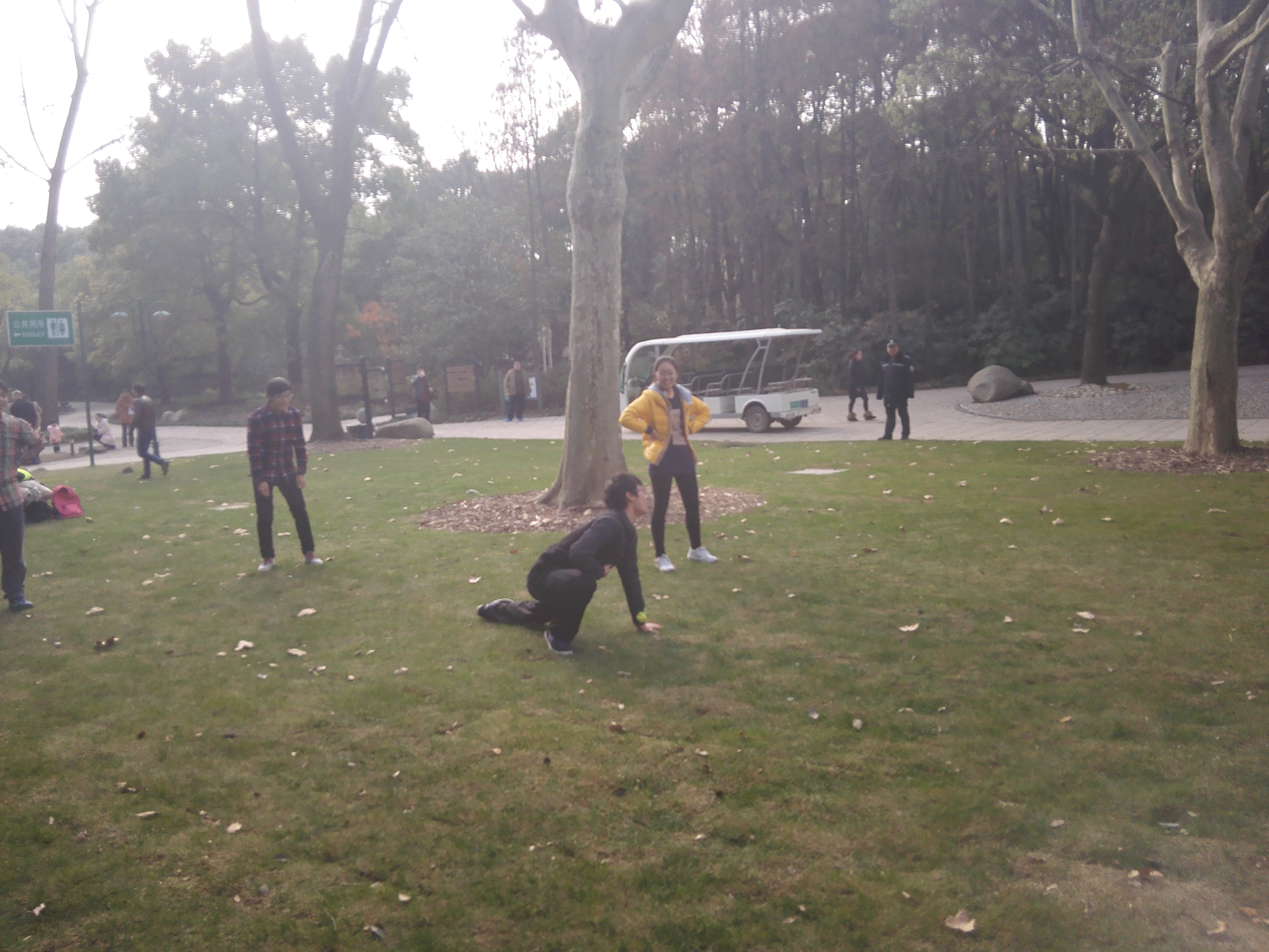 上海共青国家森林公园的草坪